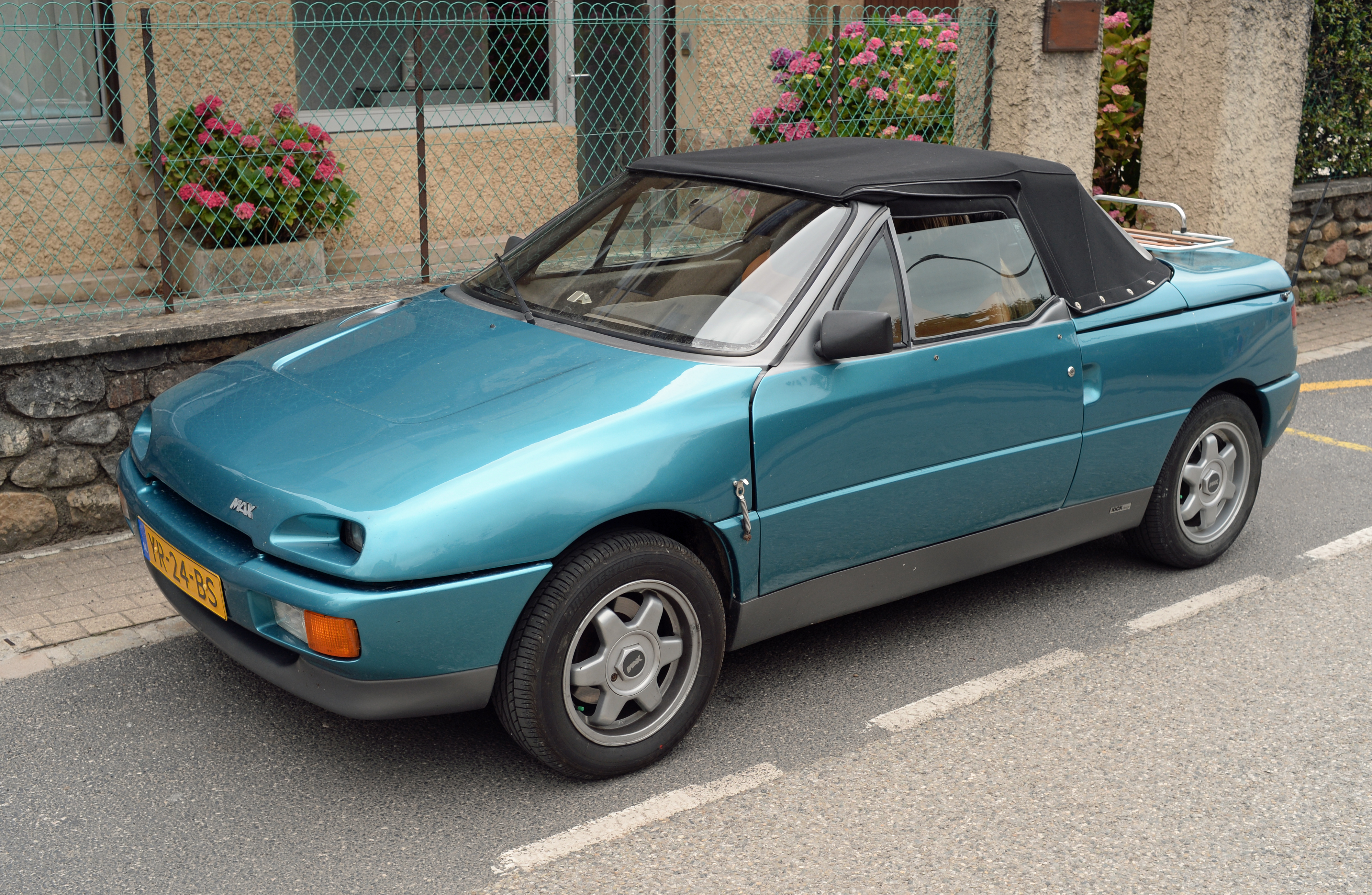 1992 MAX Roadster